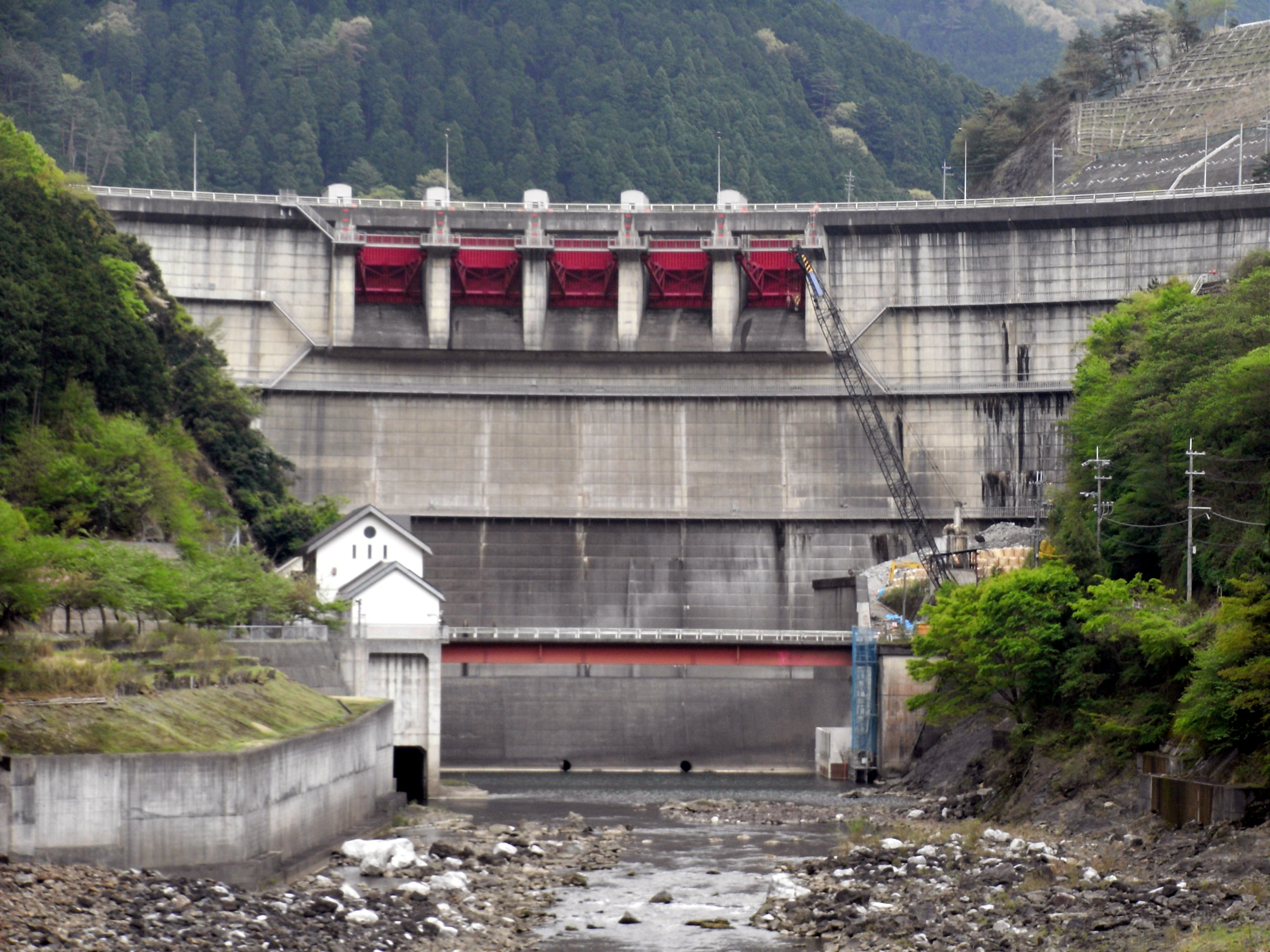 Dam